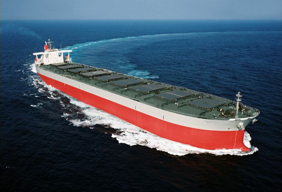 אונית מטען